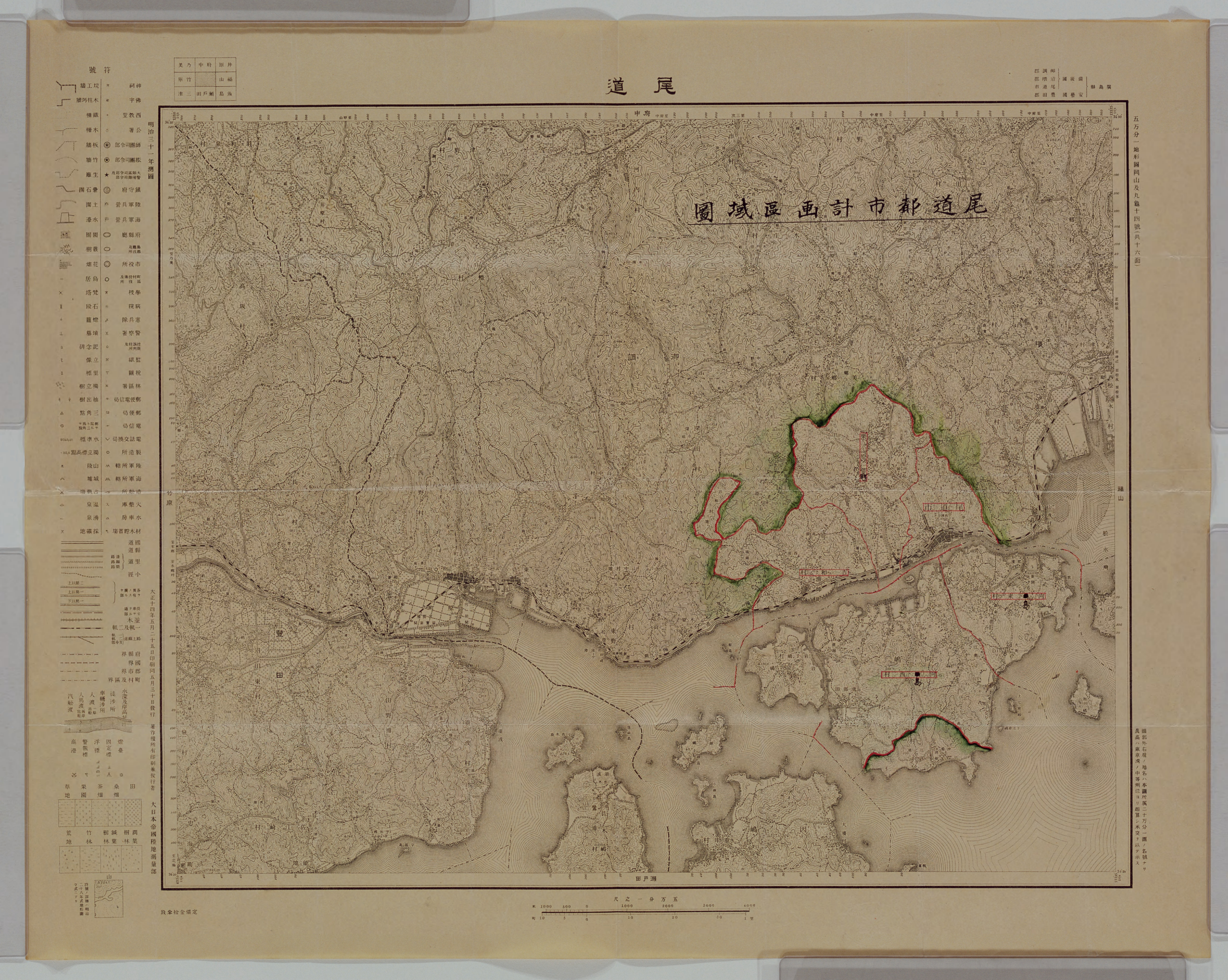 尾道都市計画区域図・昭和四年。尾道市作成。右が尾道市、左が三原市。